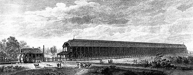 Le bâtiment de graduation Planche 9 de « L'architecture considérée sous le rapport de l'art, des moeurs et de la législation », Paris, 1804